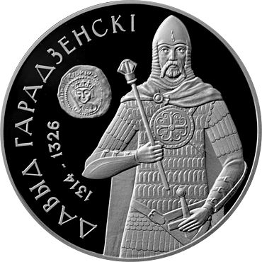 20 рубльова монета Національного банку Білорусі